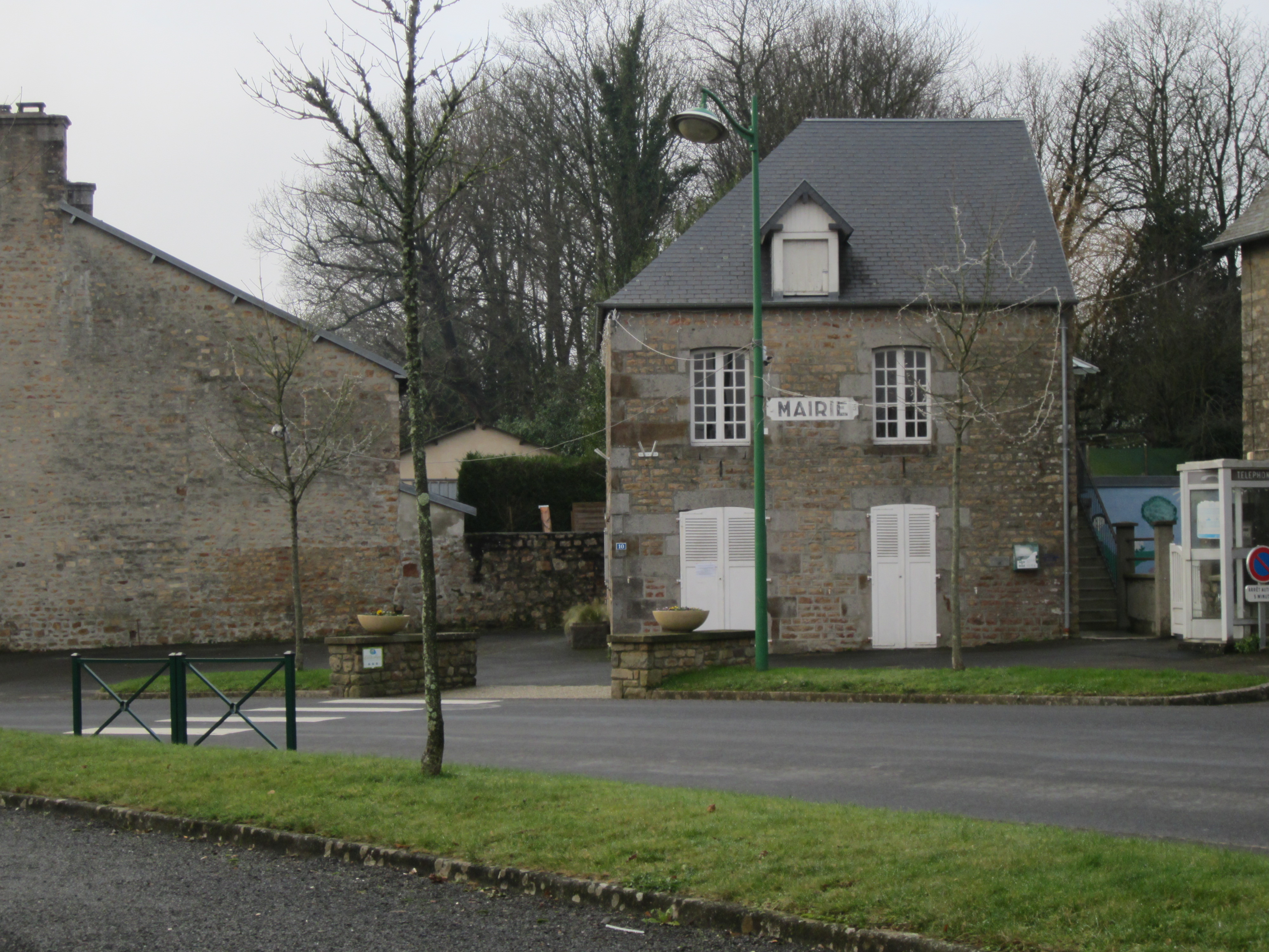 La Lucerne-d'Outremer